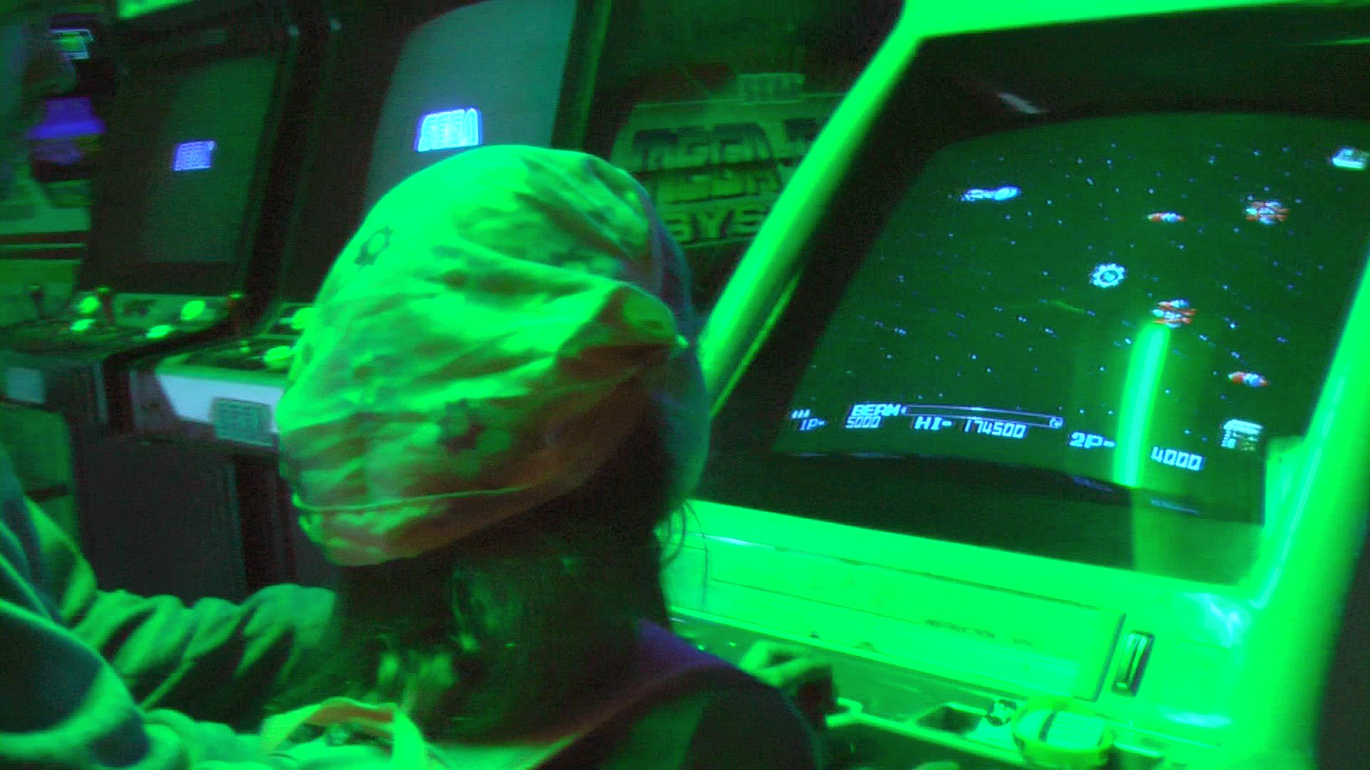 Video game machines with R-Type in the front.